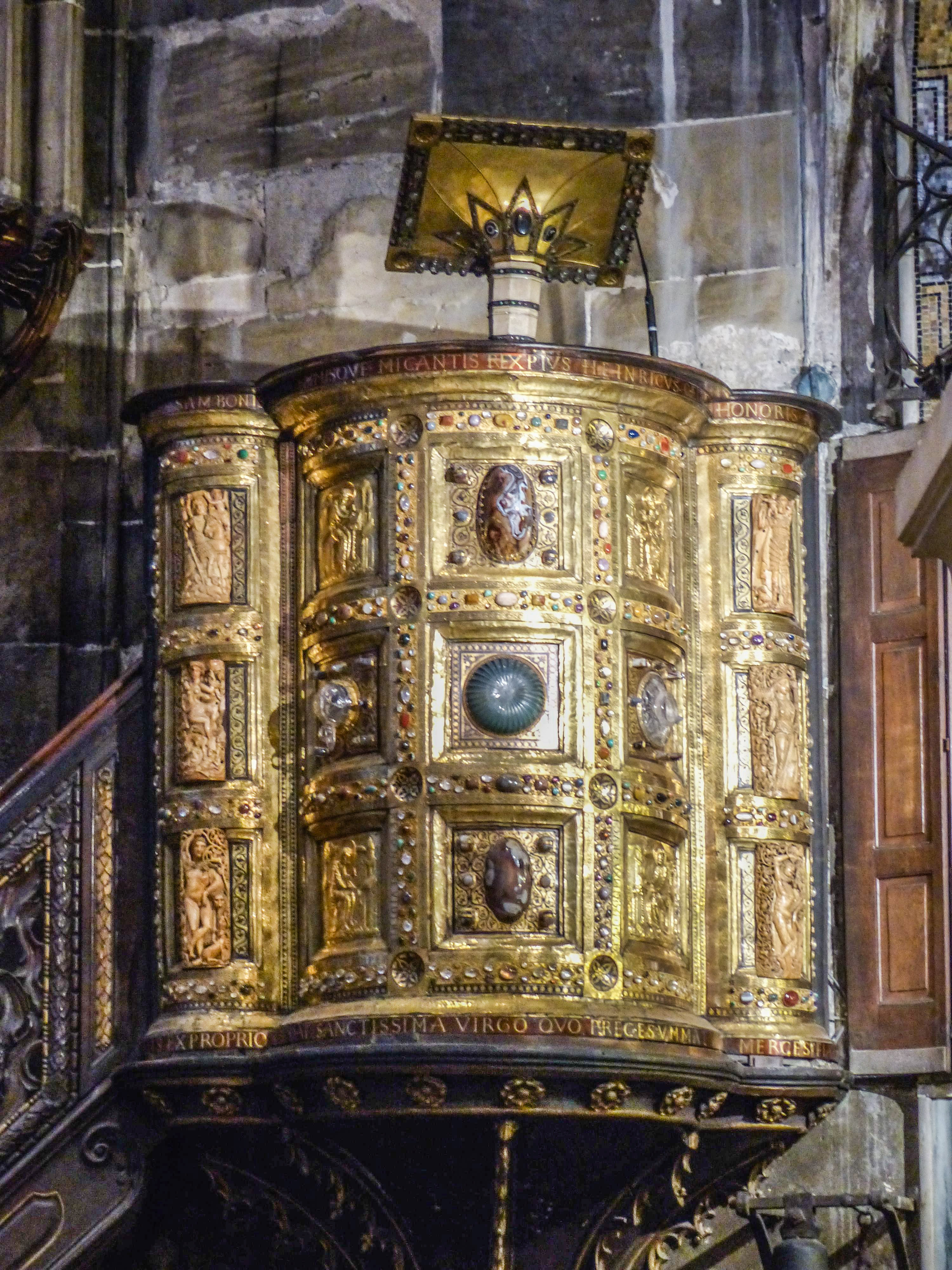 Aachener Dom: Ambo Heinrichs II